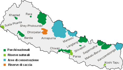 Obszary Chronione Nepalu